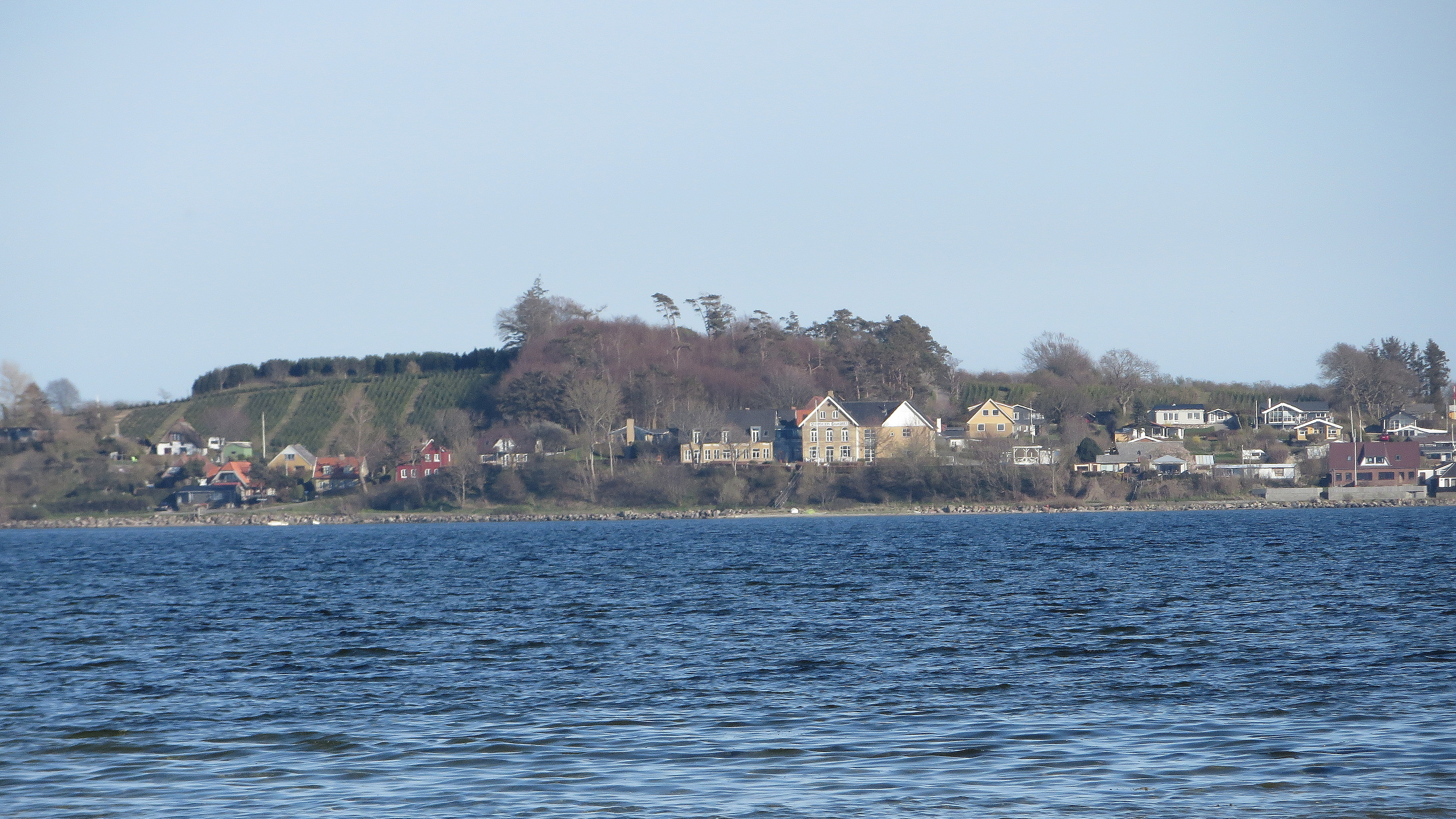 Brunsnis von Holnis aus (2015-04-19), Bild 02